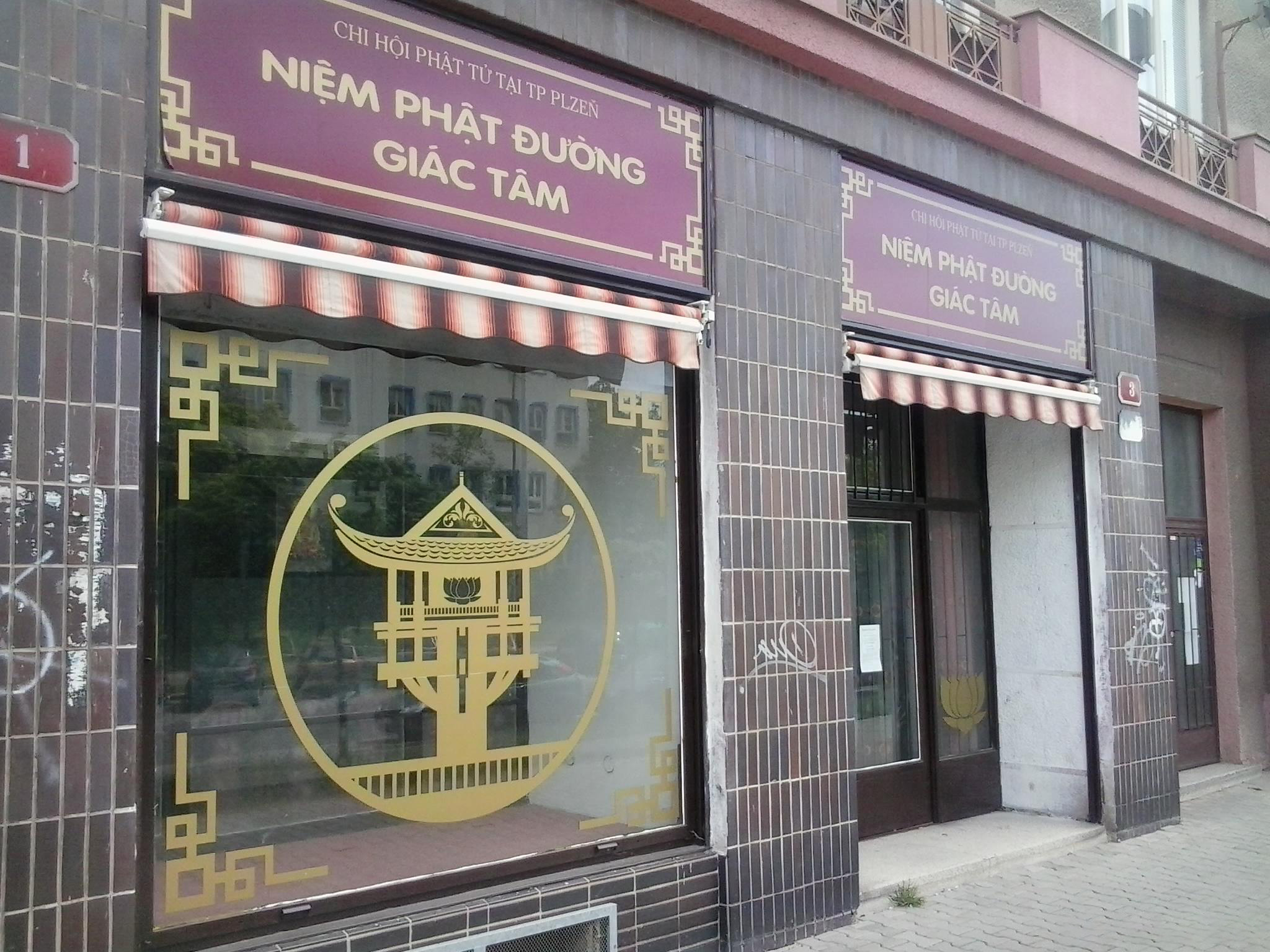 Buddhistická svatyně v Plzni